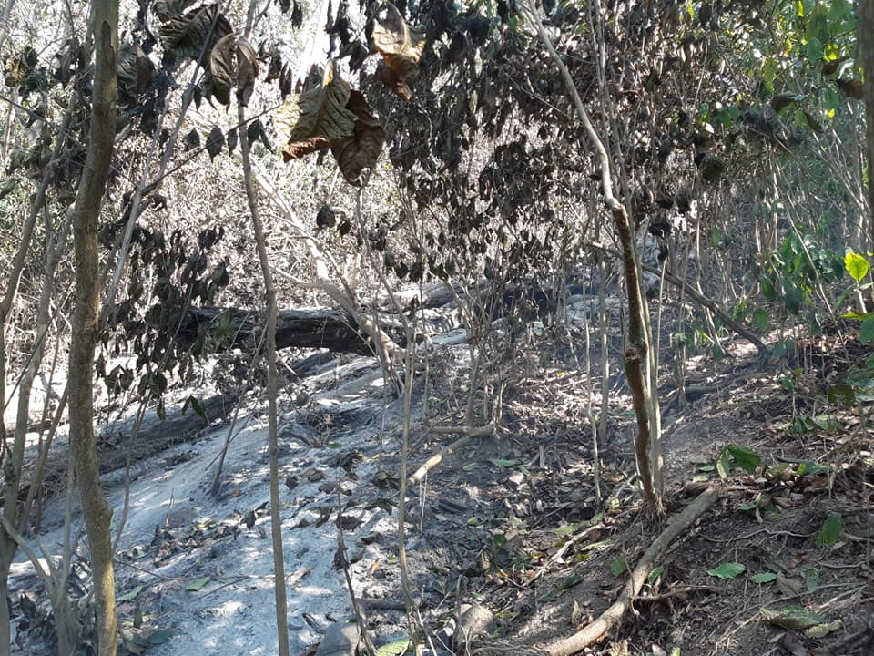 Waldbrand in Osttimor 2019. In der Nähe der Fazenda Algarve (Suco Leotala).